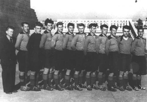 «Харчовик» (Одеса), 1947 рік: Команда «Харчовик» перед черговою грою чемпіонату СССР в Одесі. Зліва направо: старший тренер А. Е. Фомін, А. Брагін, В. Близинський, В. Пуховський, Б. Чубинсткий, А. Шумілов, Н. Хижников, С. Чиркліс, К. Богинський, Н. Потапов, М. Черкаський, Ф. Співак.